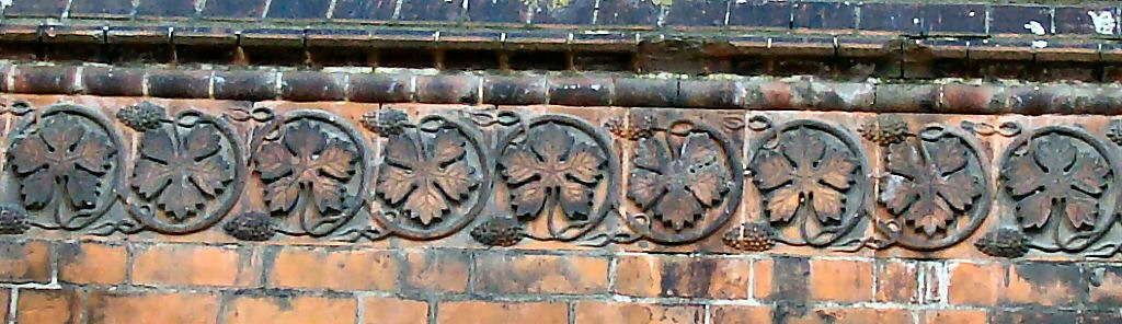 Kościół św. Jana Ewangelisty w Szczecinie - fryz podokienny z motywem winnej latorośli